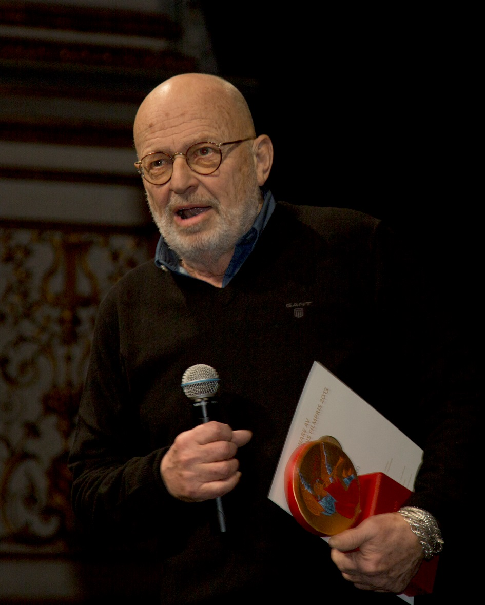 Stefan Jarl tar emot Svenska Kyrkan filmpris 2013.